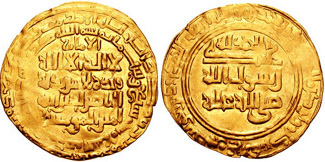 Dinar do califa abássida Nácer